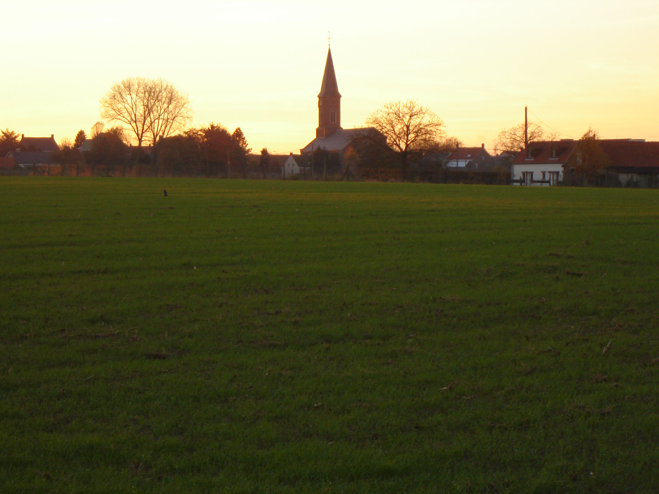 Ingooigem in Anzegem, West-Flanders, Belgium